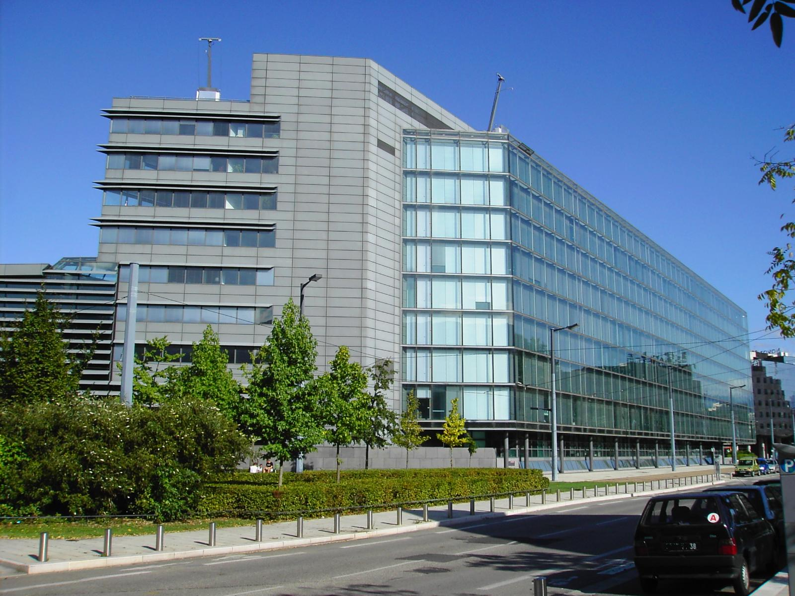 Palais de justice Grenoble , côté Nord